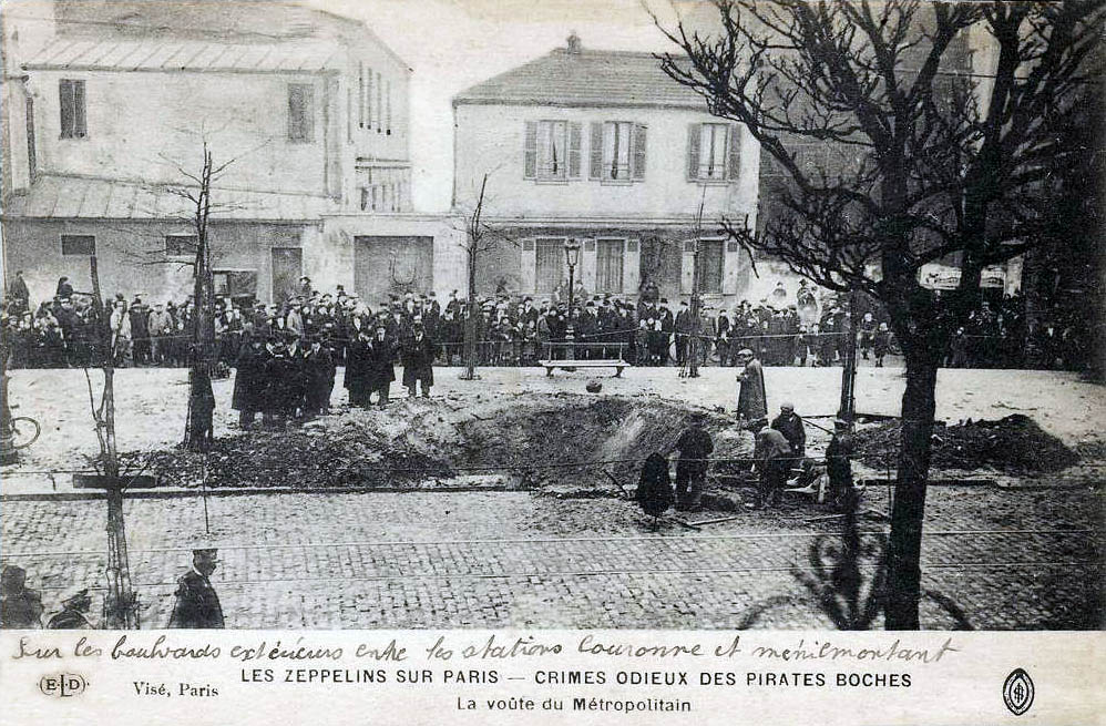 Titre:Les zeppelins sur Paris - La voûte du Métropolitain. Description: Première guerre mondiale. Raid aérien du dirigeable LZ 79 (LZ 49) sur Paris, le samedi 29 janvier 1916. Cratère au-dessus de la voûte de la ligne 2 du métro sur les boulevards extérieurs entre les stations Couronne et Ménilmontant, Boulevard de Belleville, XIe arrondissement, Paris, France[1]. ↑ 29 janvier 1916 - Un Zeppelin allemand bombarde Paris sur